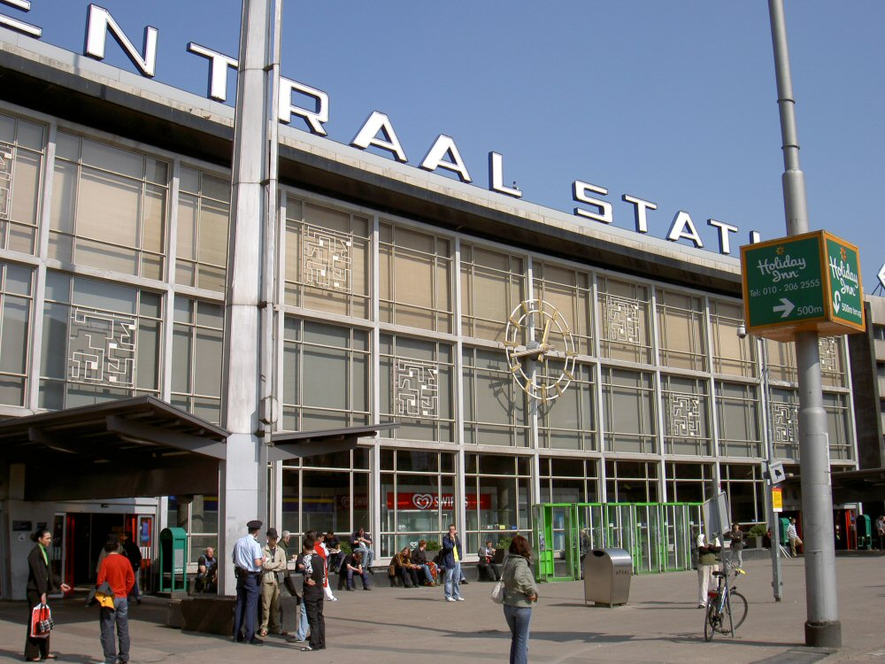 Rotterdam Central